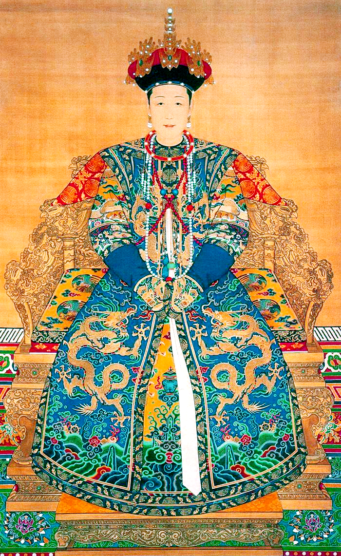 Empress Xiaogongren (1660-1723)